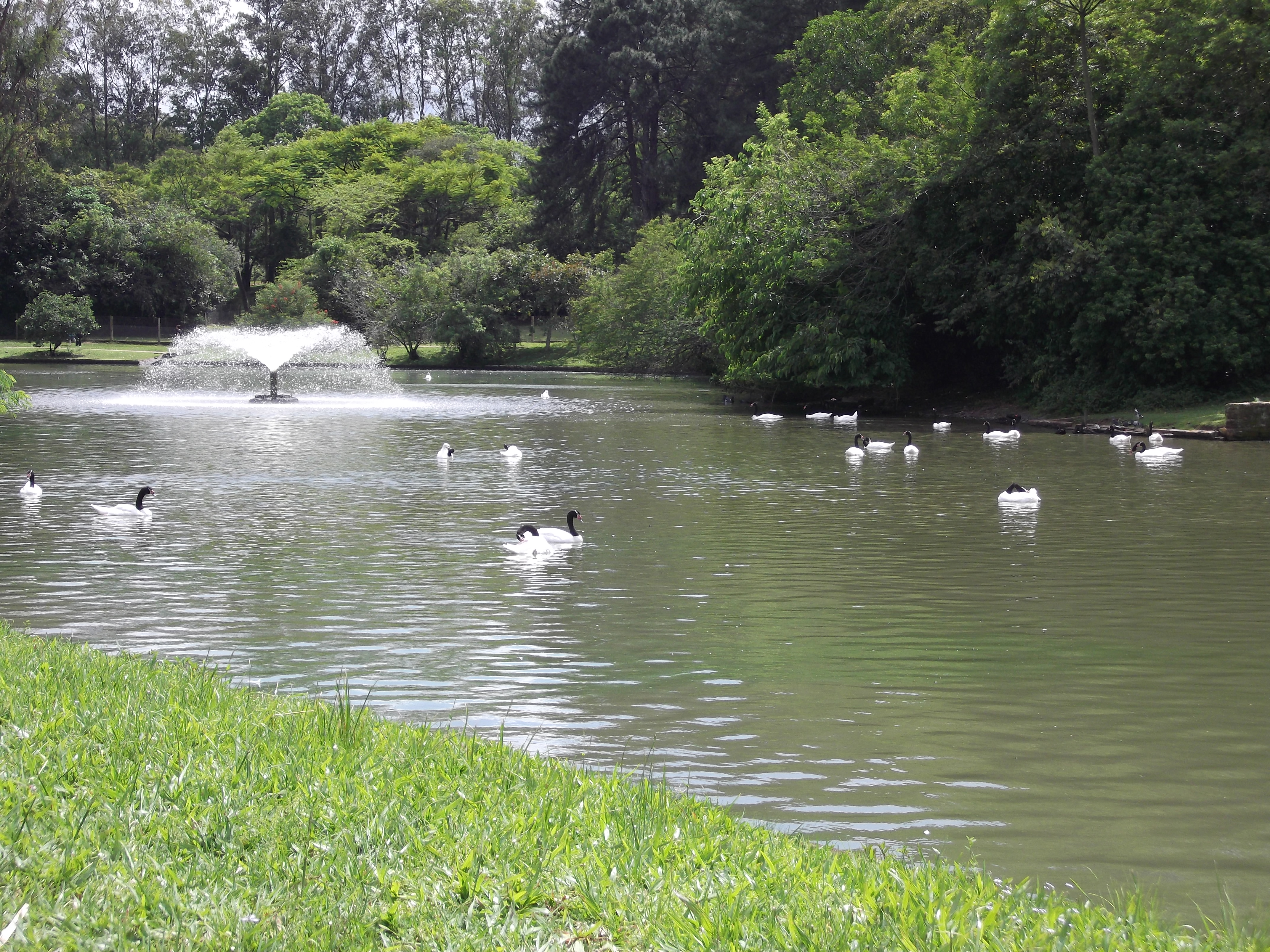 Cygnus melancoryphus, Parque Zoológico de Sapucaia do Sul, Brazil : Lago